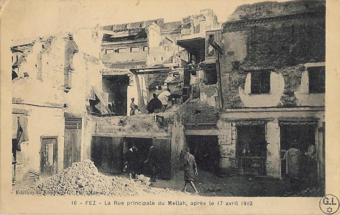 הריסות במלאח של פאס לאחר הפוגרום של 1912